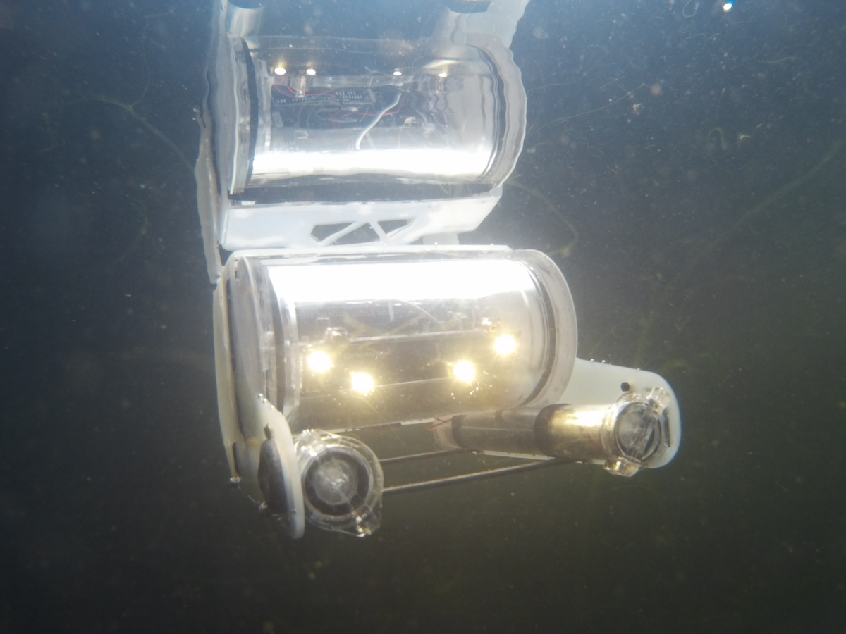 Primeira proba do OpenROV no río Liñares